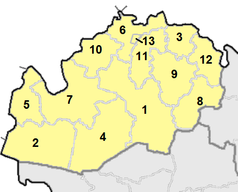 Административная карта Западно-Казахстанской области